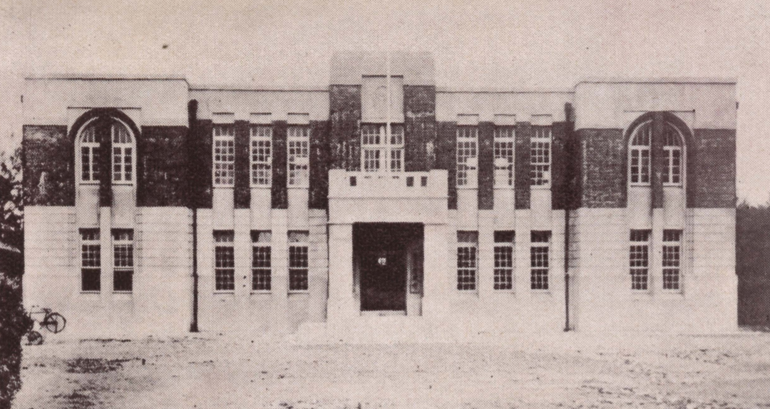 中文（台灣）: 高雄州恆春郡役所